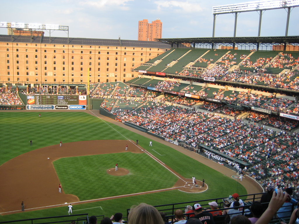 Oriole Park at Camden Yards